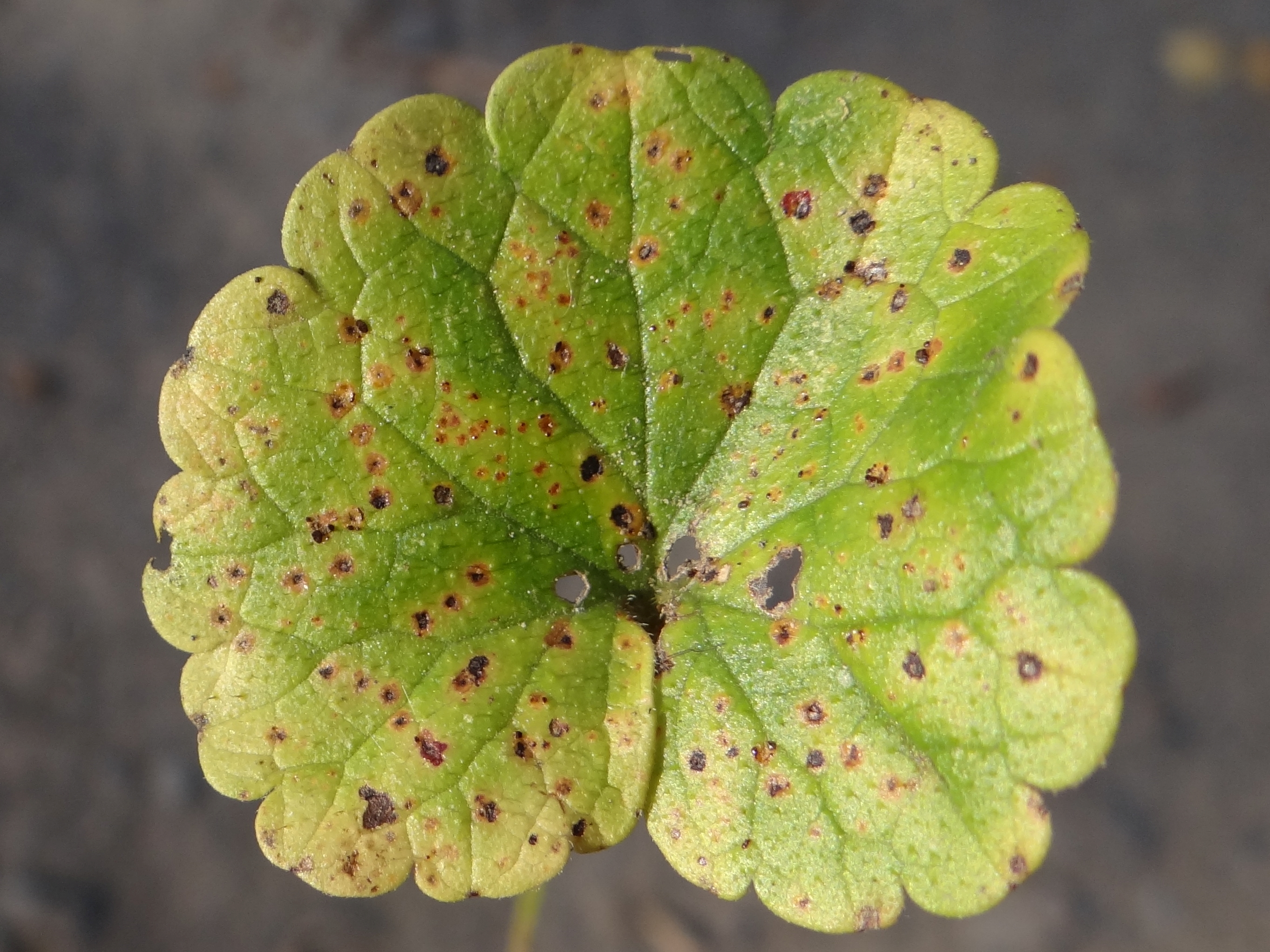 Puccinia glechomatis on Glechoma hederacea. Locvation: Poland, Gdów